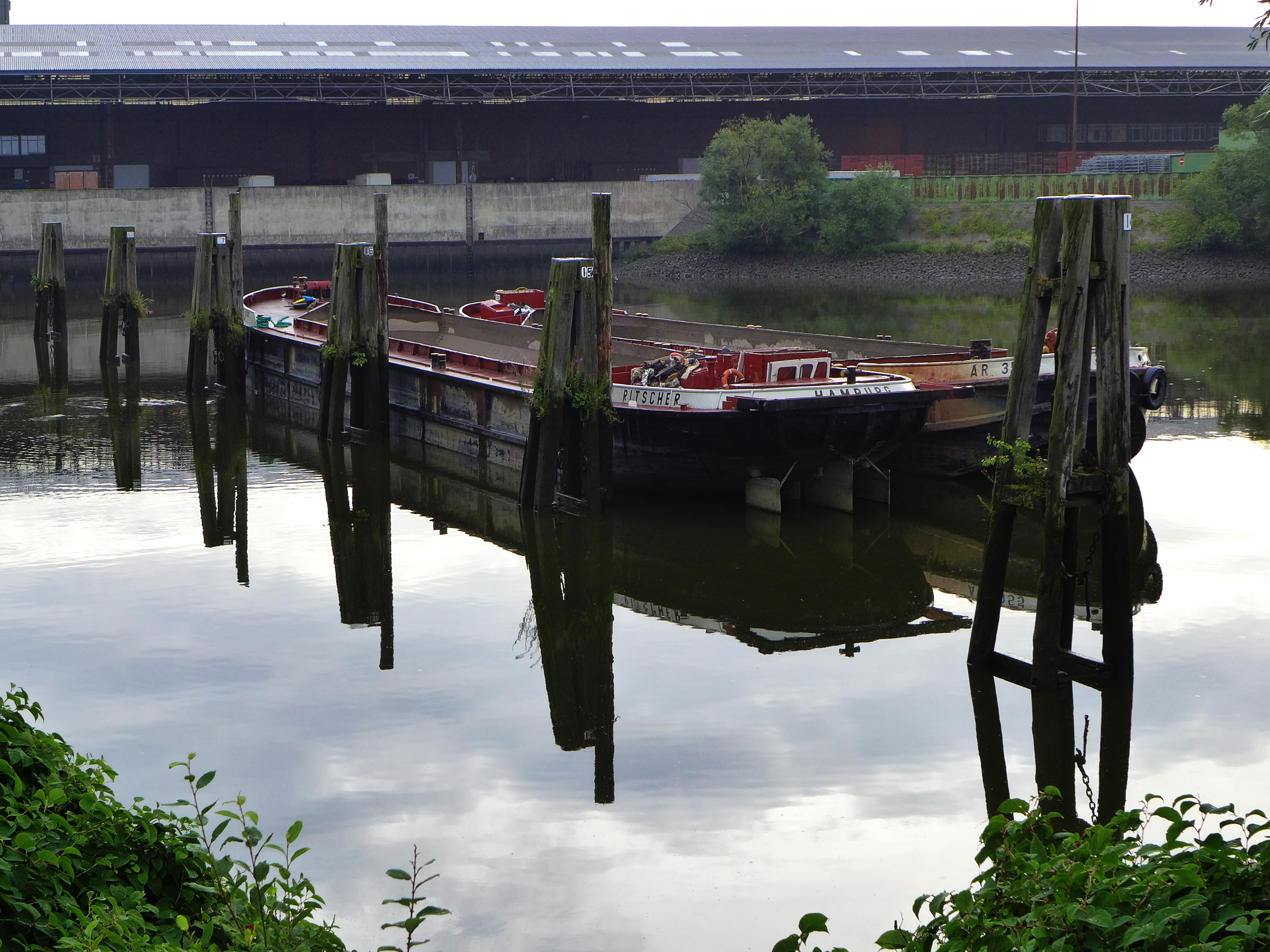 Zwei Frachtkähne haben an den Duckdalben im Moldauhafen auf dem Kleinen Grasbrook festgemacht.